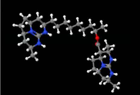 Estructura tridimensional de la batzelladina F